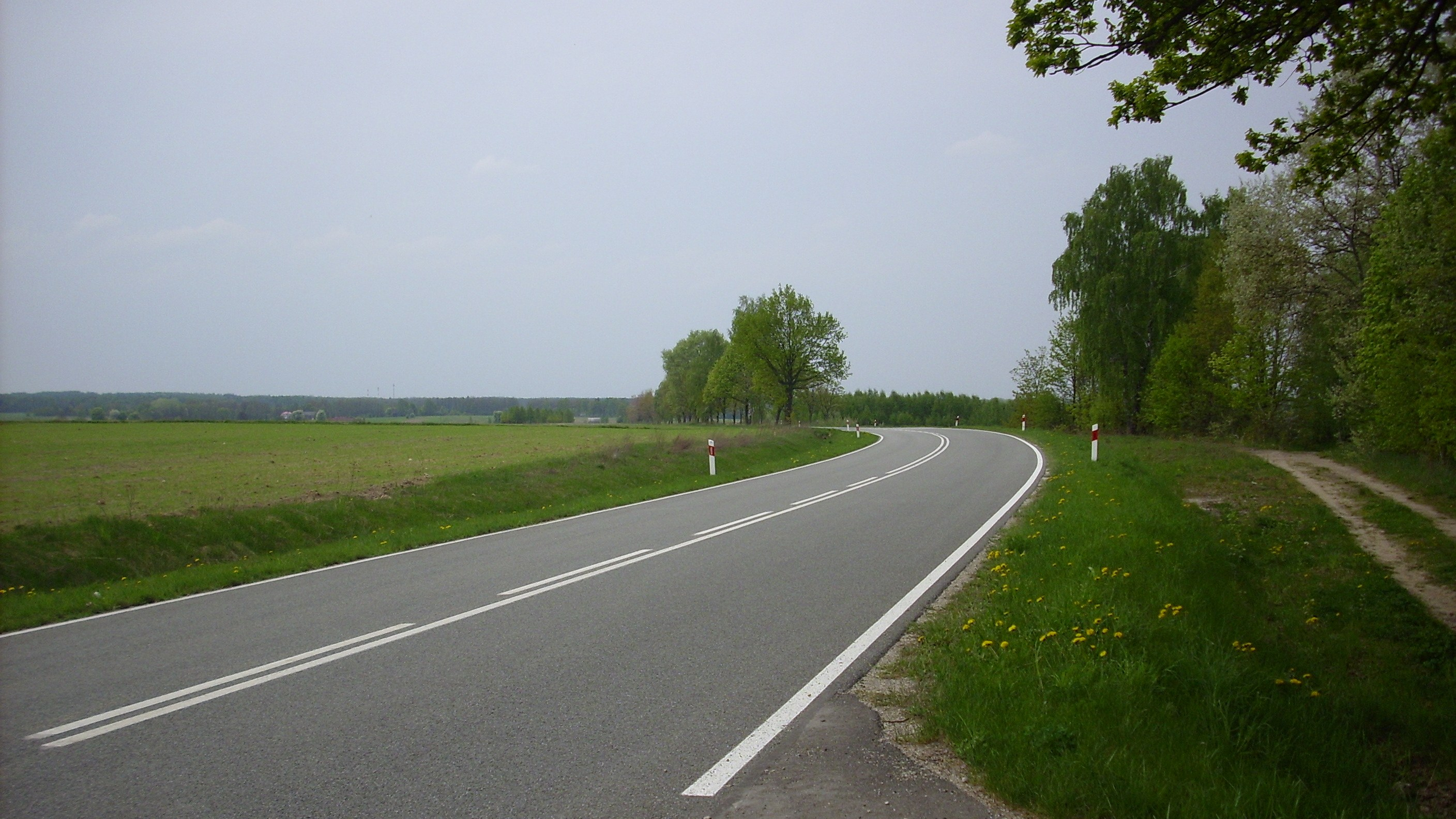 Droga wojewódzka nr 698 na północ od Nepli (woj. lubelskie, Polska).